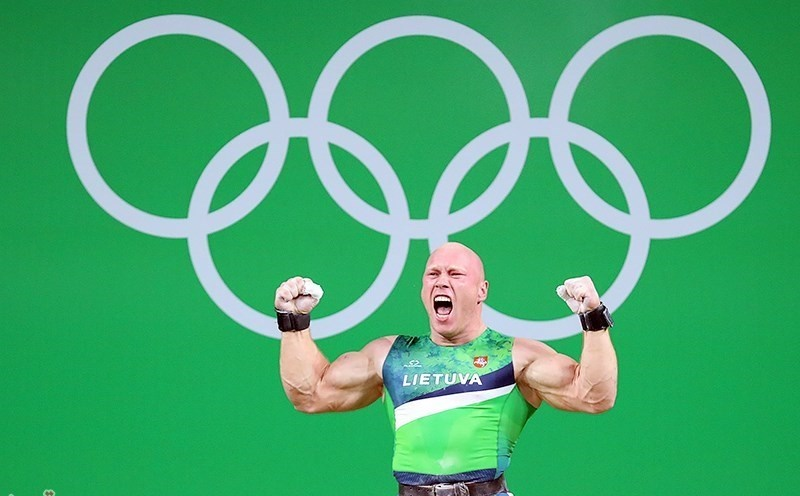 وزنه‌برداری در بازی‌های المپیک تابستانی ۲۰۱۶ – ۹۴ کیلوگرم مردان